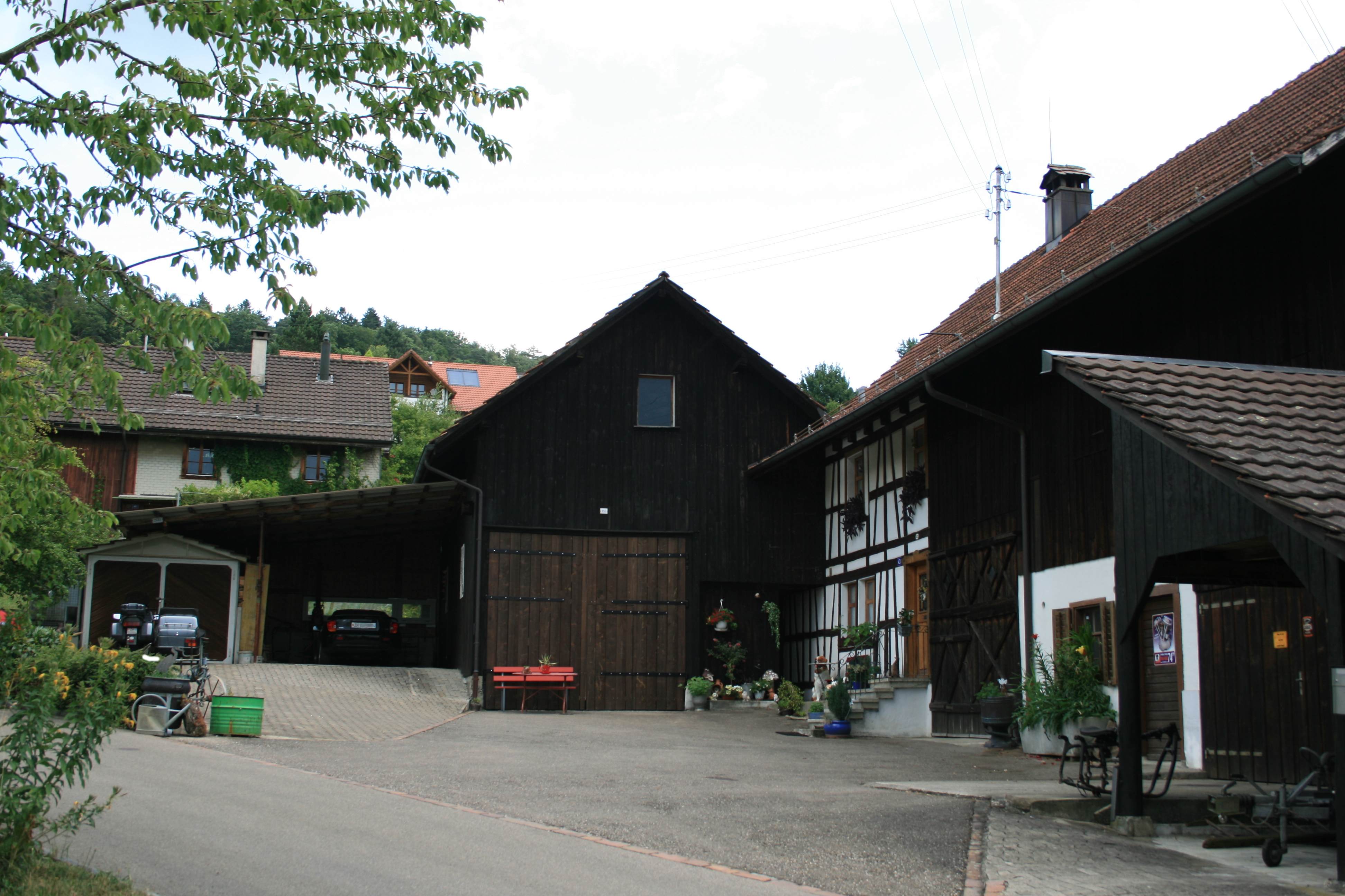 Stockenerstrasse 48. Kommunales Inventarobjekt der Stadt Winterthur, 1812 erbaut, gehörte zum Weiler Stocken.